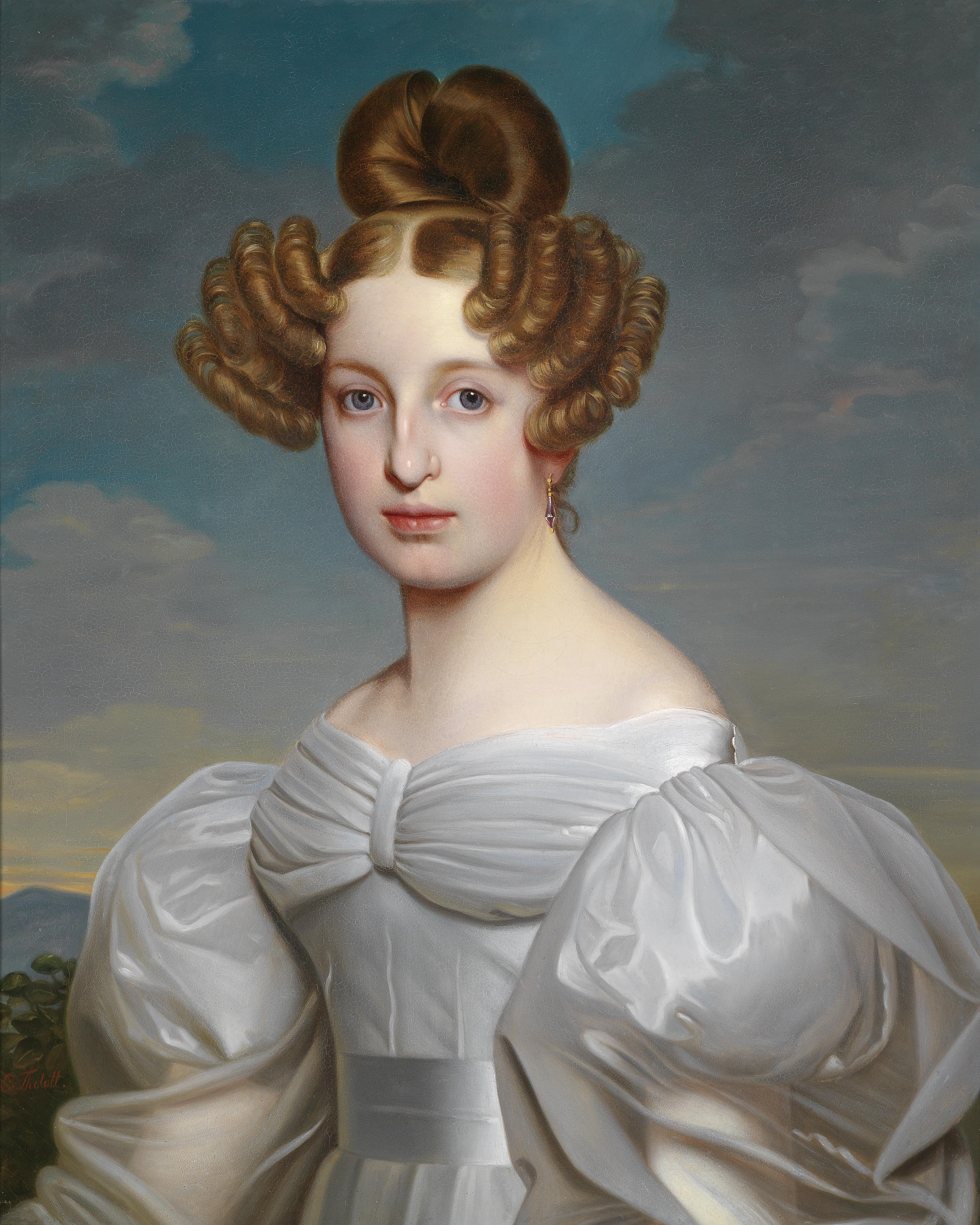 Portrait der Elise Dorothea Friederike, Freifrau von Schaezler, geb. Freifrau von Süsskind (1810–1831), signiert E. Thelott, rückseitig Klebeetikett mit Legende